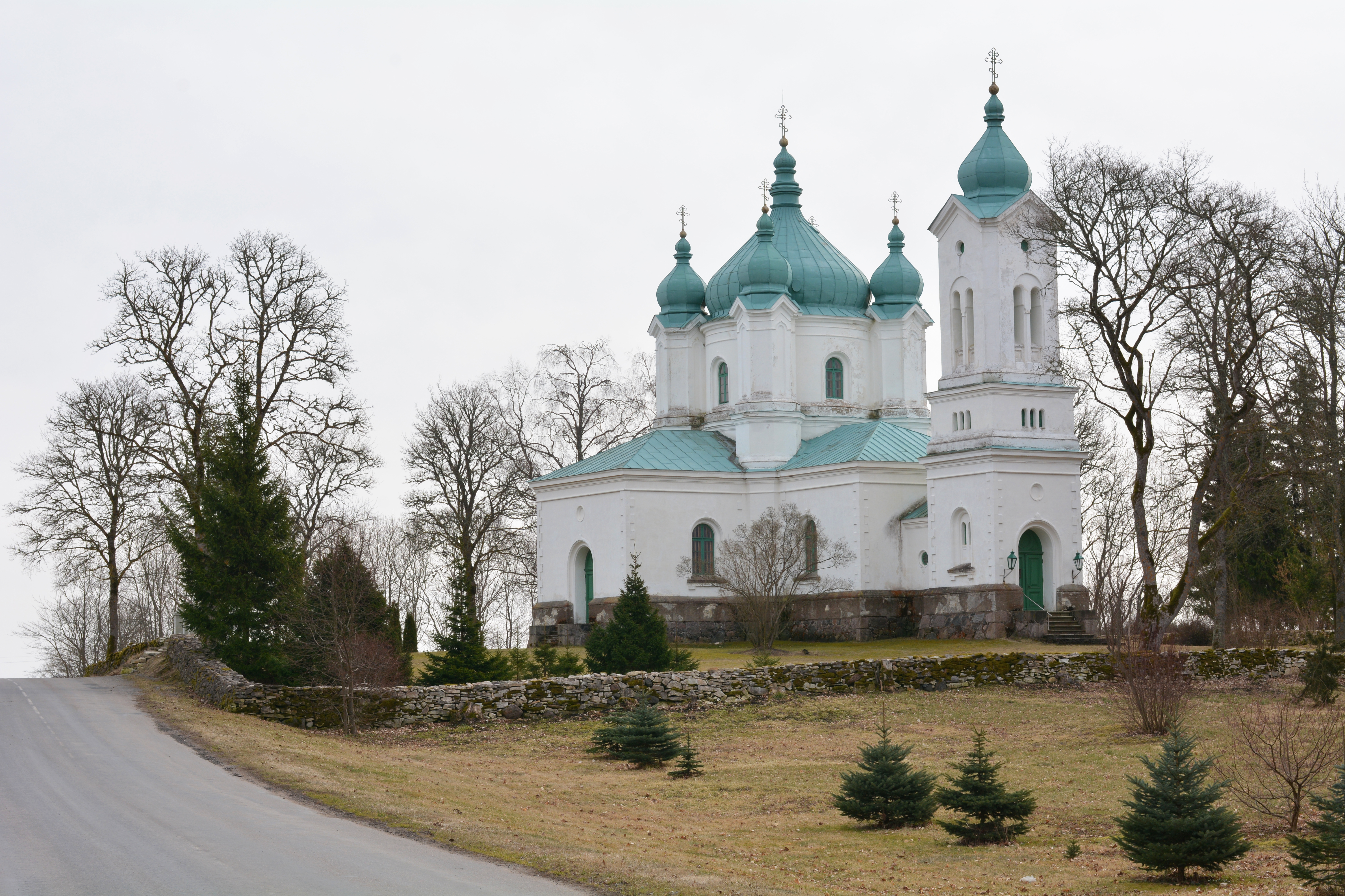 Tornimäe õigeusu kirik